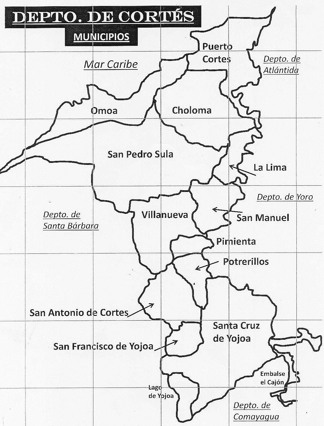 Mapa de los Municipios del Departamento de Cortés en Honduras dibujado con la técnica de cuadrícula